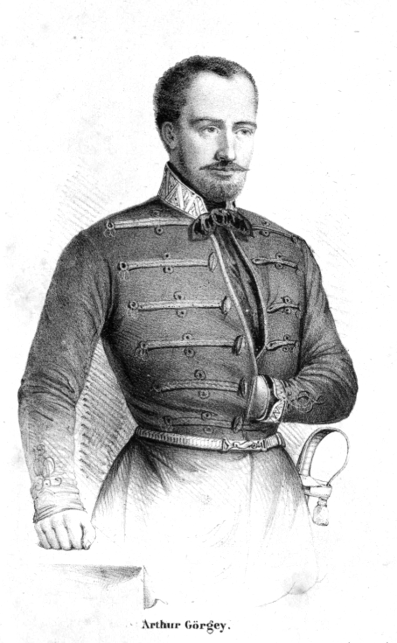 Artúr (Arthur) Görgey von Görgő und Toporc (* 30. Januar 1818 in Toporec (ungarisch Toporc), damals Komitat Zips, heute Slowakei; † 21. Mai 1916 in Budapest), war ein ungarischer General und Politiker während der Revolution von 1848 und gilt als interner Gegenspieler des Revolutionsführers Lajos Kossuth.